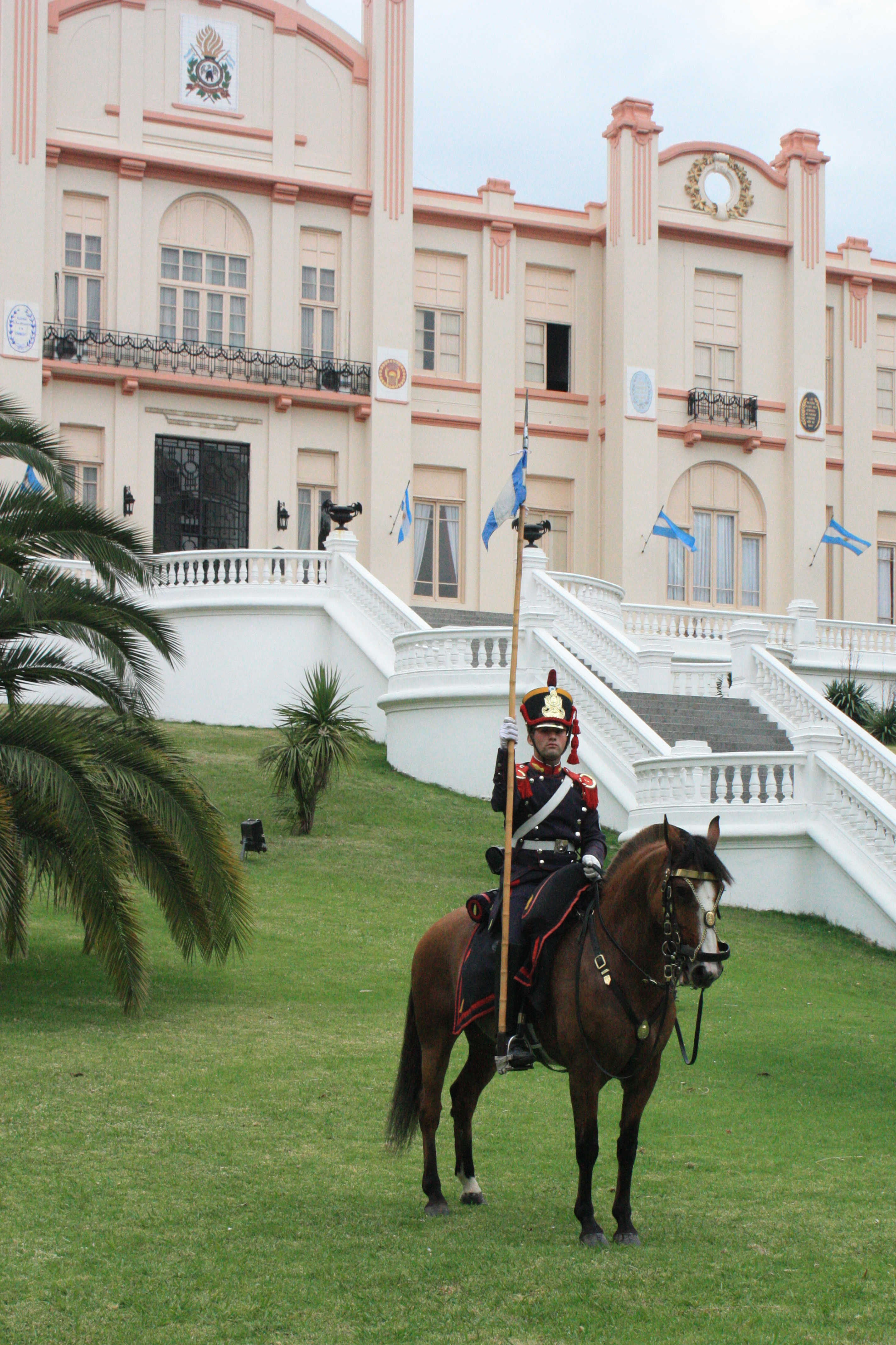 Regimiento de Granaderos a Caballo Gral. San Martín